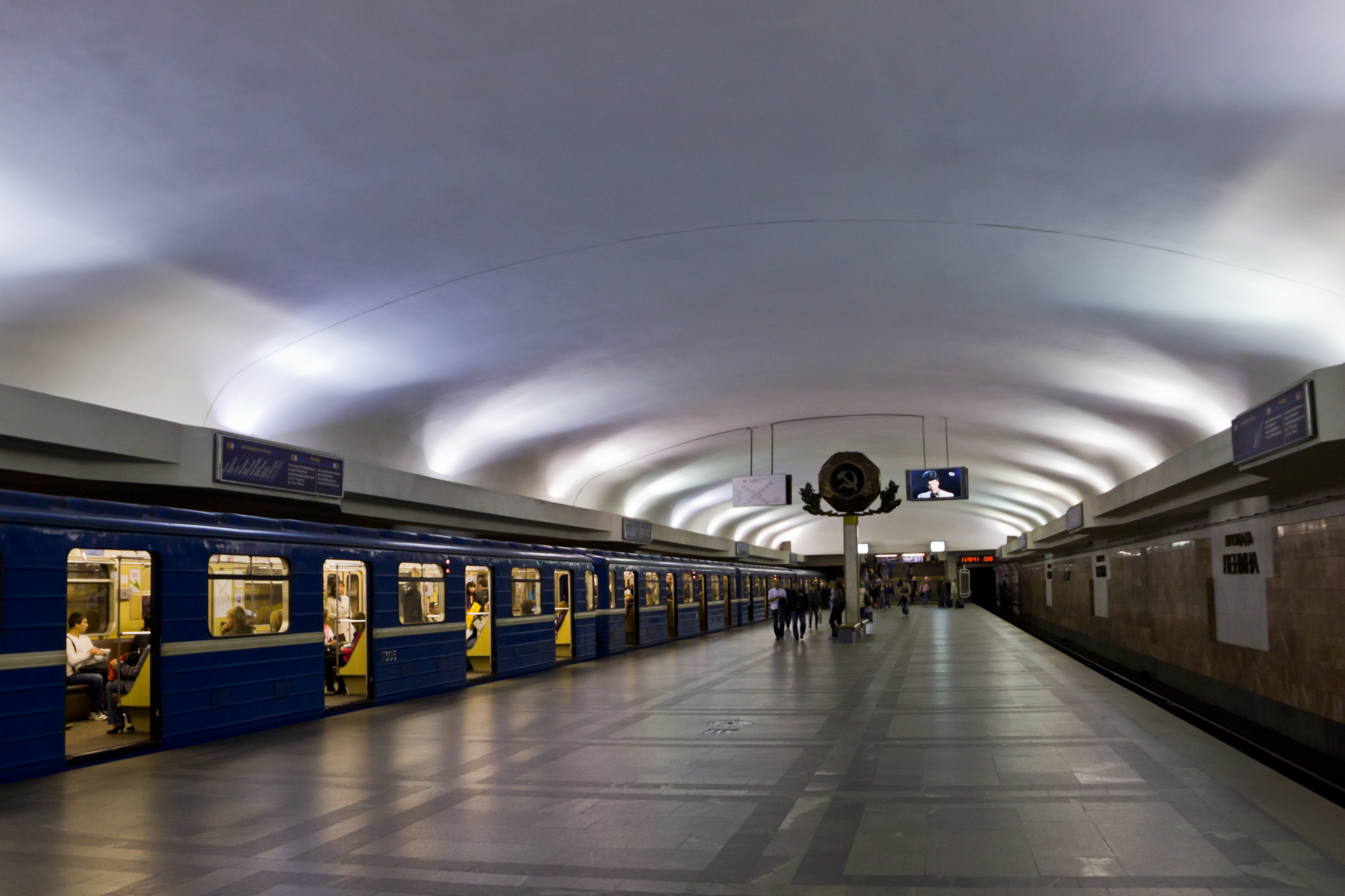 Станция метро «Площадь Ленина», Минск